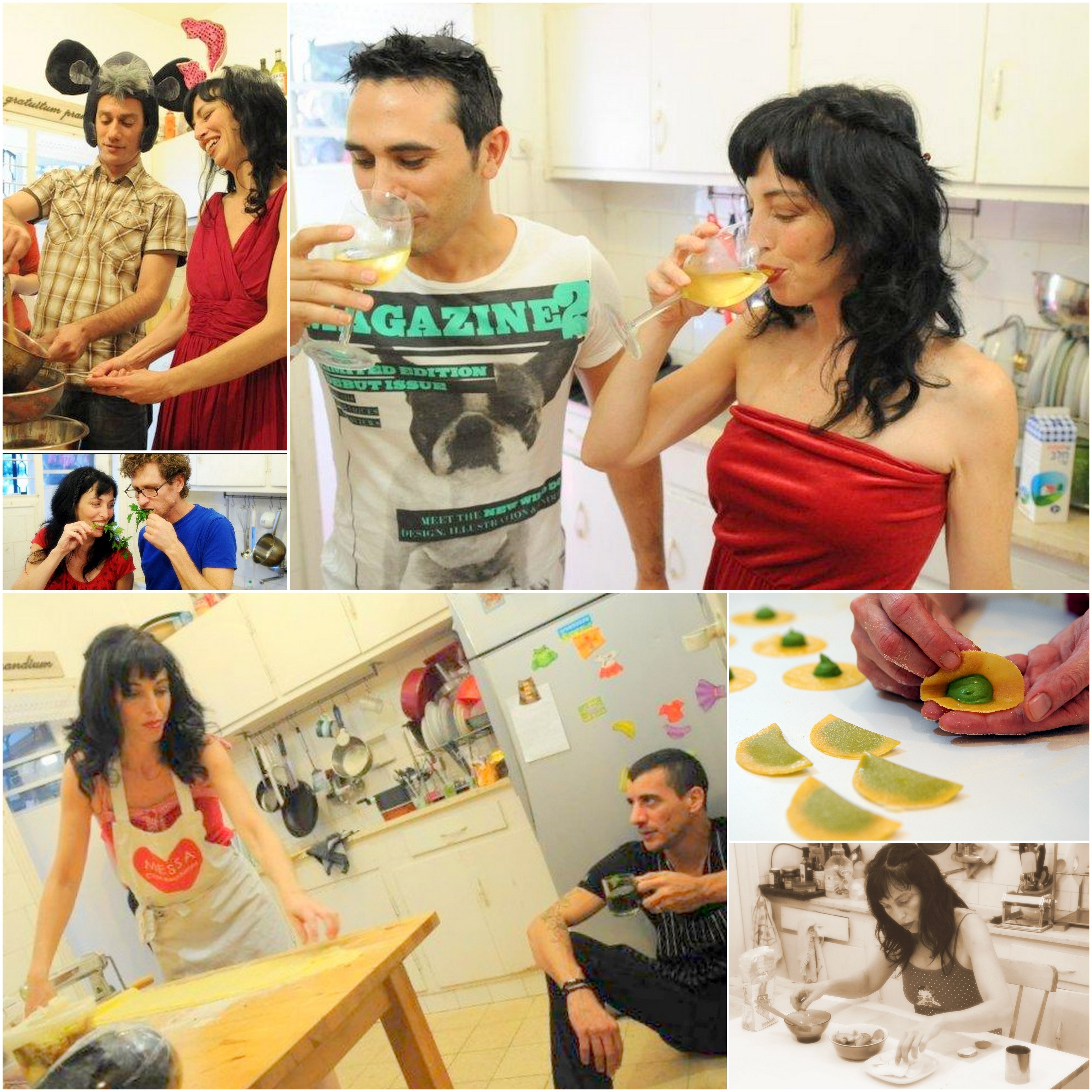 קולאז' תמונות ממטבחה של דנה מלמד